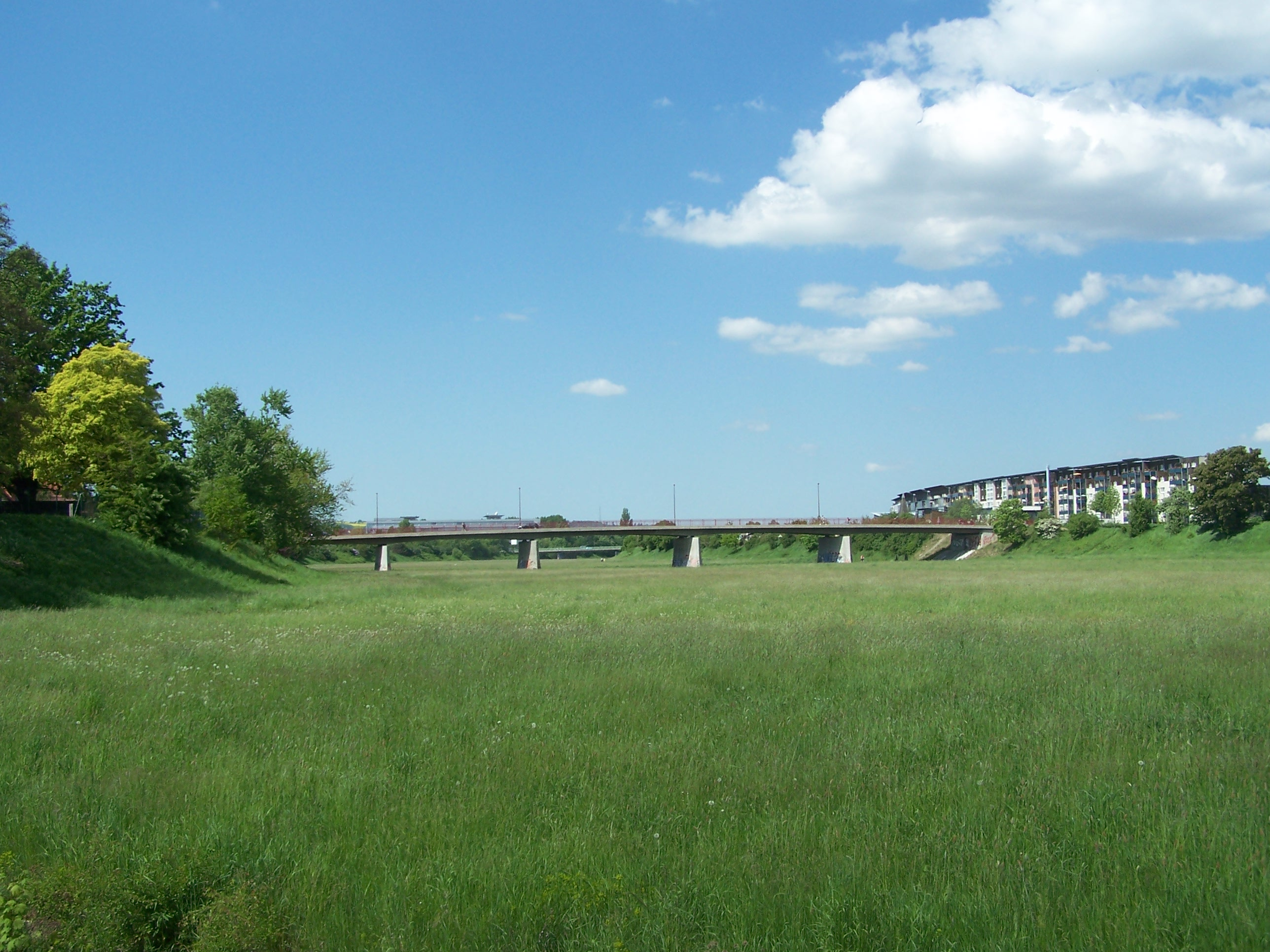 rechtselbische Flutrinne Kaditz in Dresden